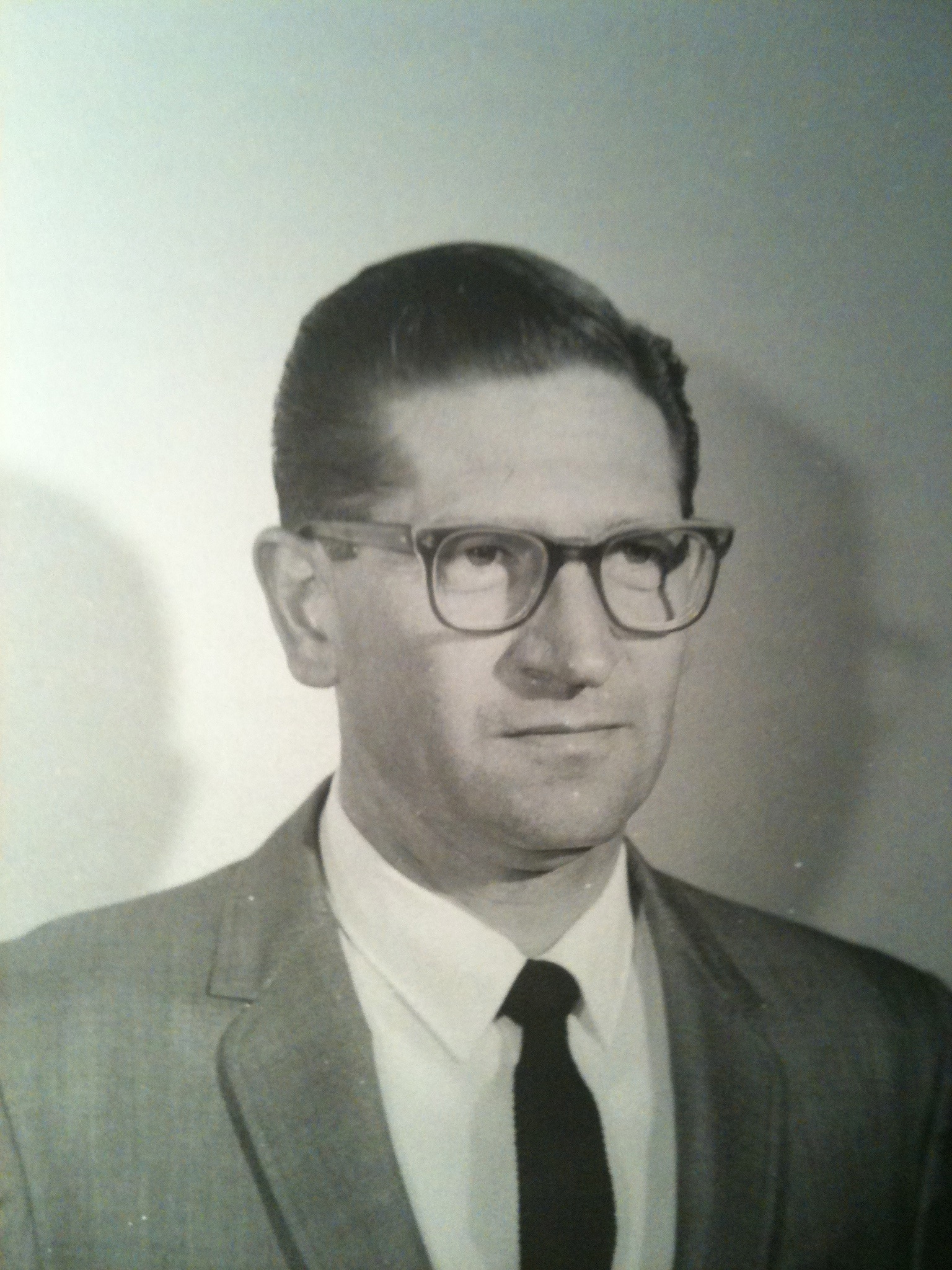 Fotografía de Jorge González Reyna en la Sala de Consejo de la Facultad de Arquitectura de la UNAM